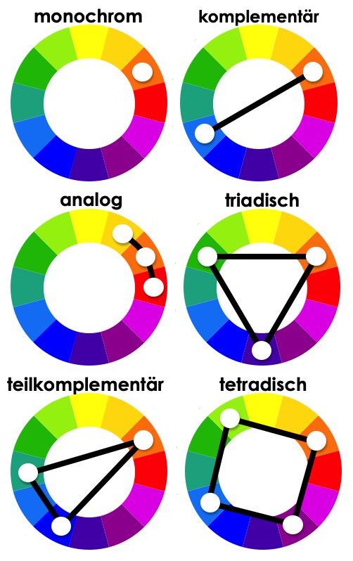 Farbschemata